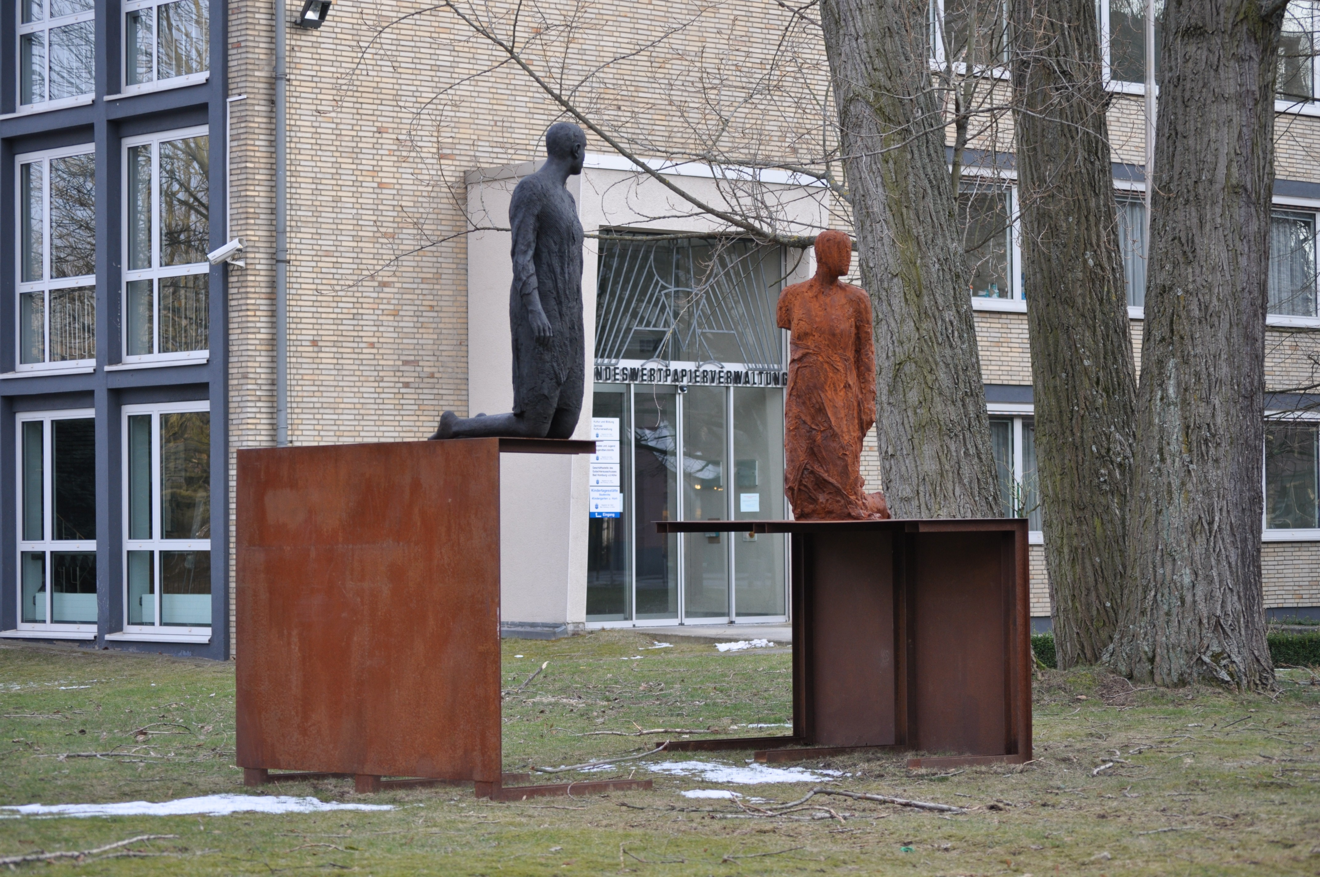 Das Bild zeigt das Kunstwerk „Melancholia I“ der niederländischen Künstlerin Hanneke Beaumont in der Skulpturenallee in Bad Homburg. Das Kunstwerk wurde auf der „Blickachsen 7“ gezeigt, anschliessend für 137.000 € durch die Stadt Bad Homburg gekauft und am 18. Dezember 2009 auf dem Grundstück der Bundeswertpapierverwaltung links neben dem Fußweg zu deren Eingang aufgestellt.